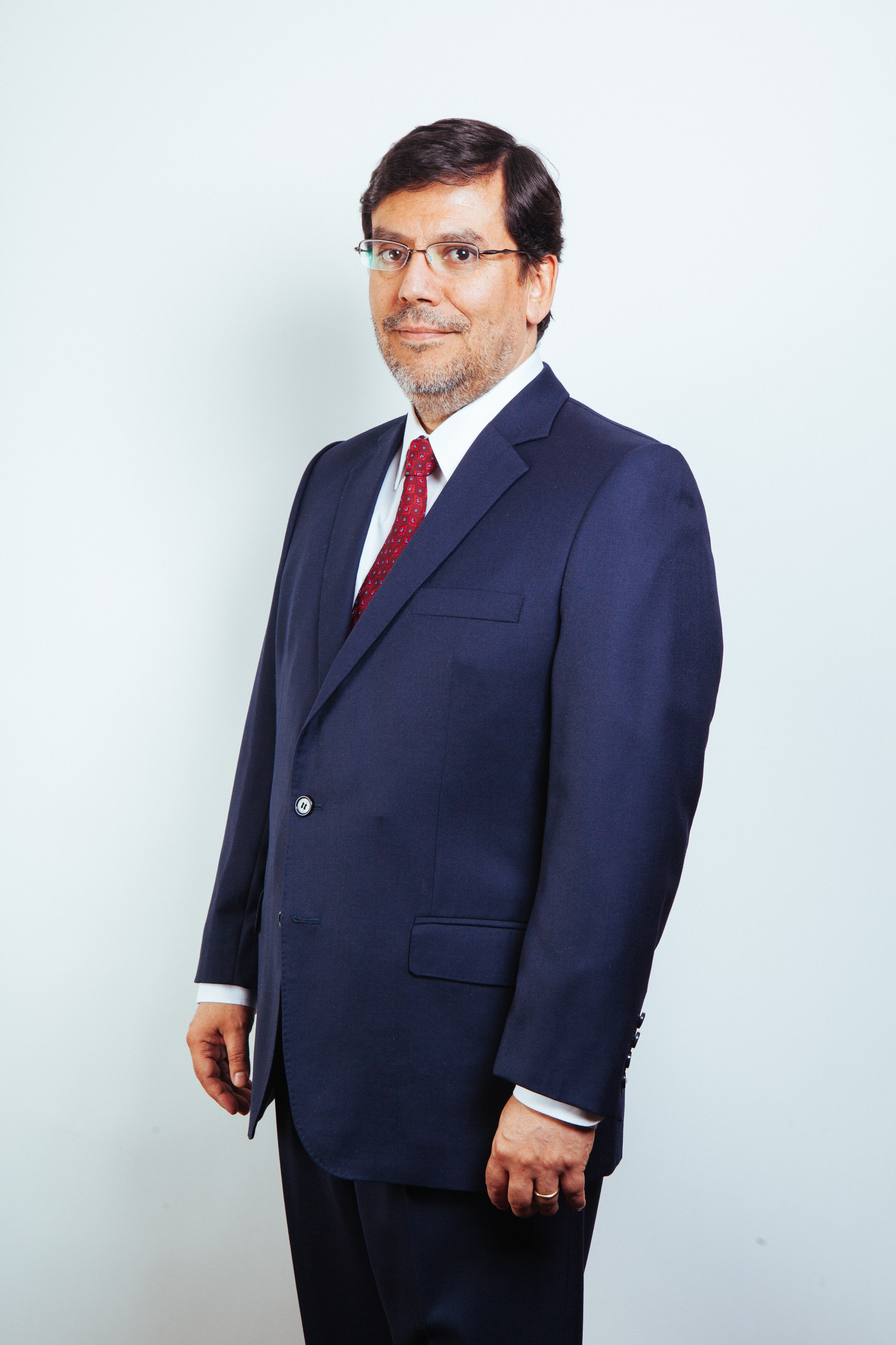 Ministro de Estado del segundo gobierno de Michelle Bachelet (2014-2018)